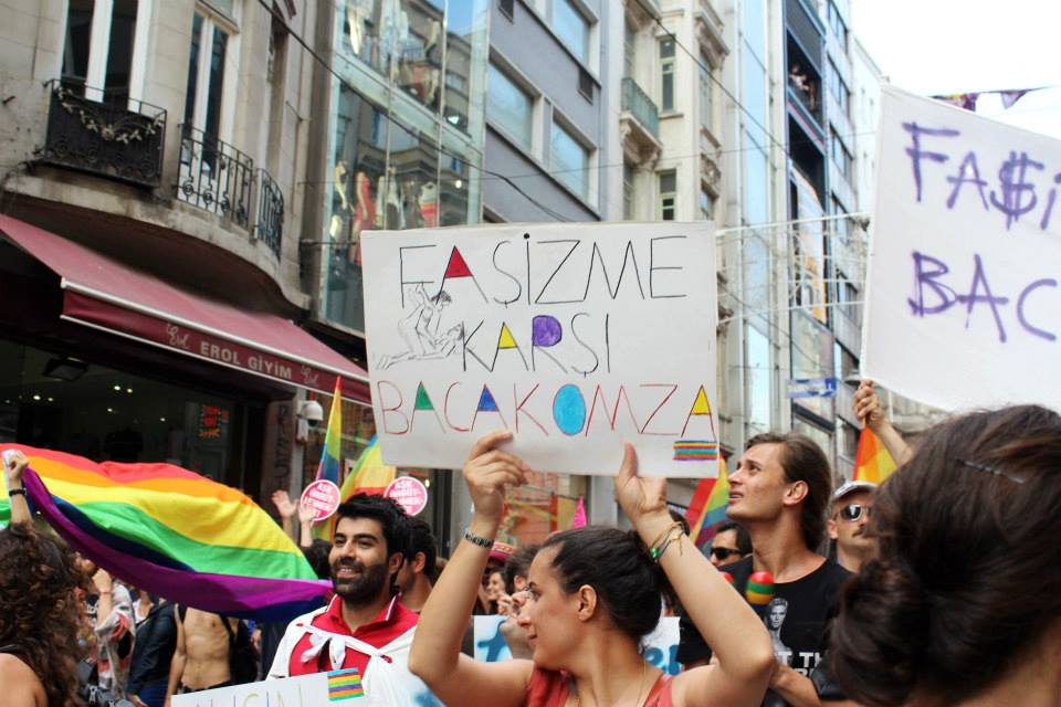 LGBT Onur Haftası, 21. LGBT Onur Yürüyüşü, 2013, Taksim, İstanbul.